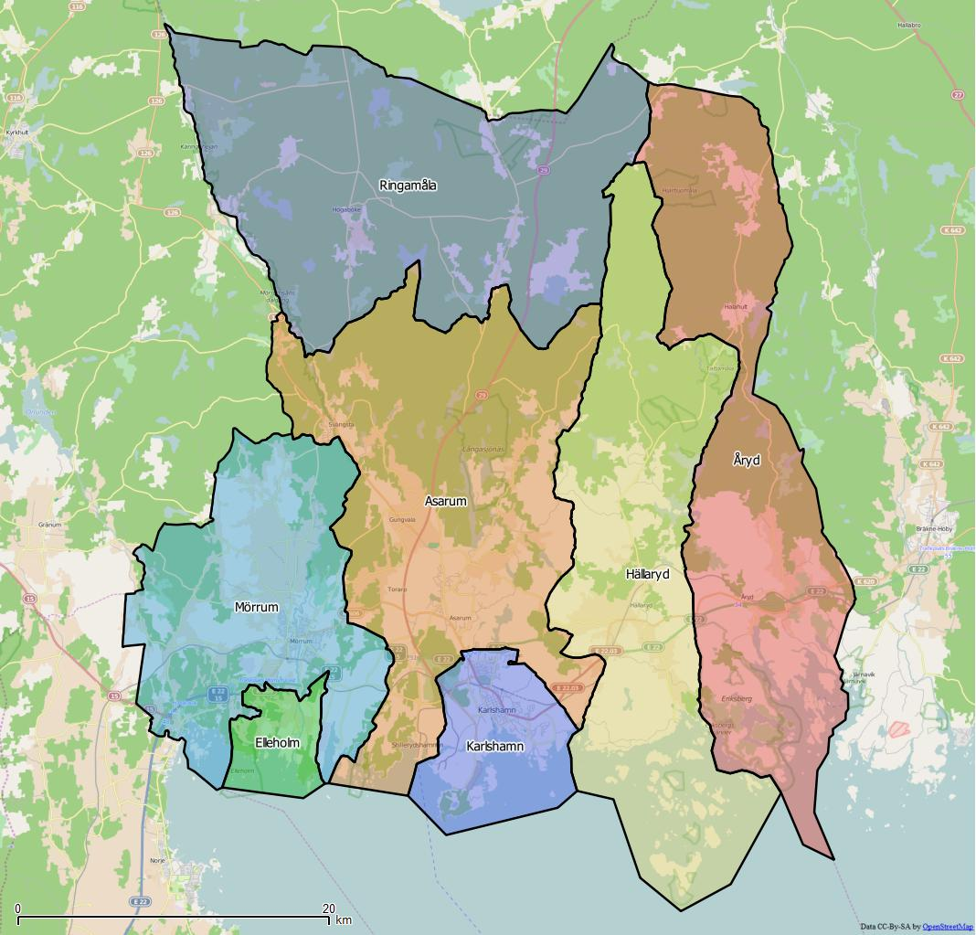 Distriktsindelningen i Karlshamns kommun World file: 58.66898077582523285 0 0 -58.66898077582523285 1622834.91853961418382823 7637958.73473295103758574